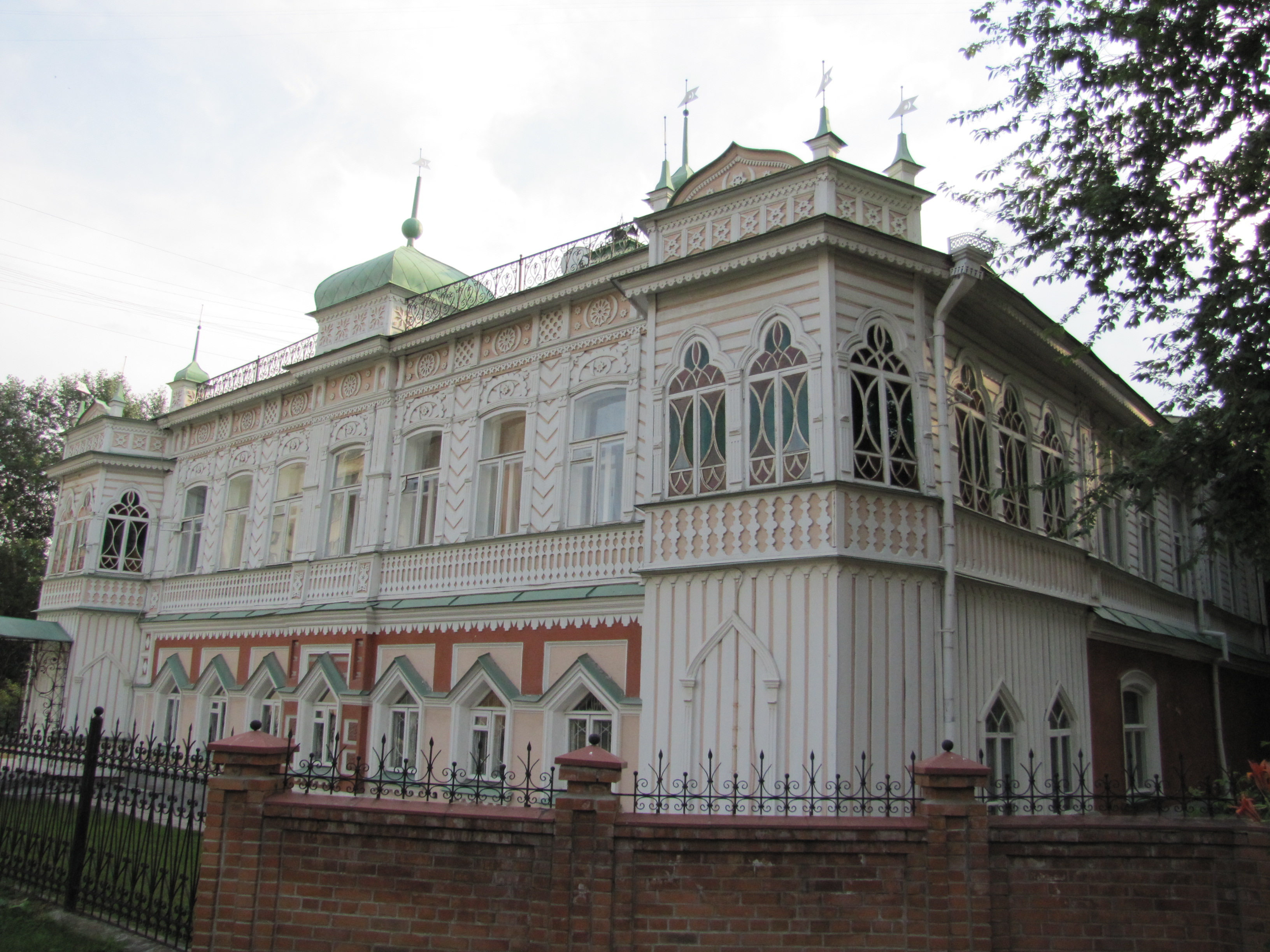 Дом купцов агафуровых (Свердловская область, Екатеринбург, сакко и ванцетти улица, 24)